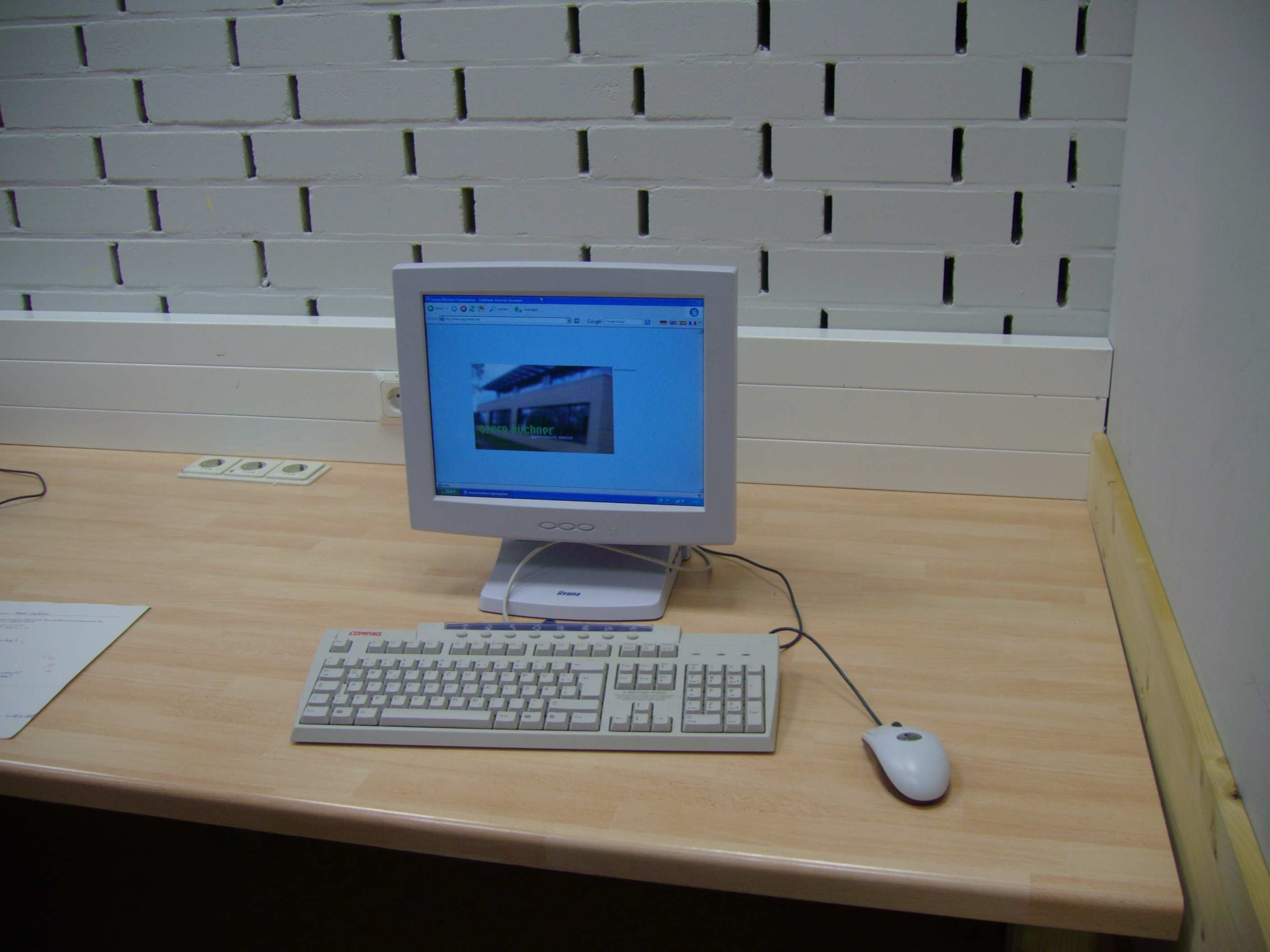 Ein Computer-Monitor von iiyama mit Tastatur und Maus im Internetcafé des Georg-Büchner-Gymansiums in Seelze